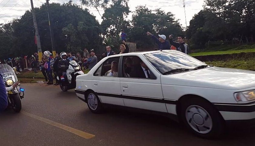 Papa Francisco a bordo de un Peugeot blanco, modelo 405 SR, mismo vehículo que utilizara Juan Pablo II en su visita a Paraguay ocurrida en 1988. Pasó por San Lorenzo, Paraguay, rumbo a Caacupé, el sábado 11 de julio de 2015.